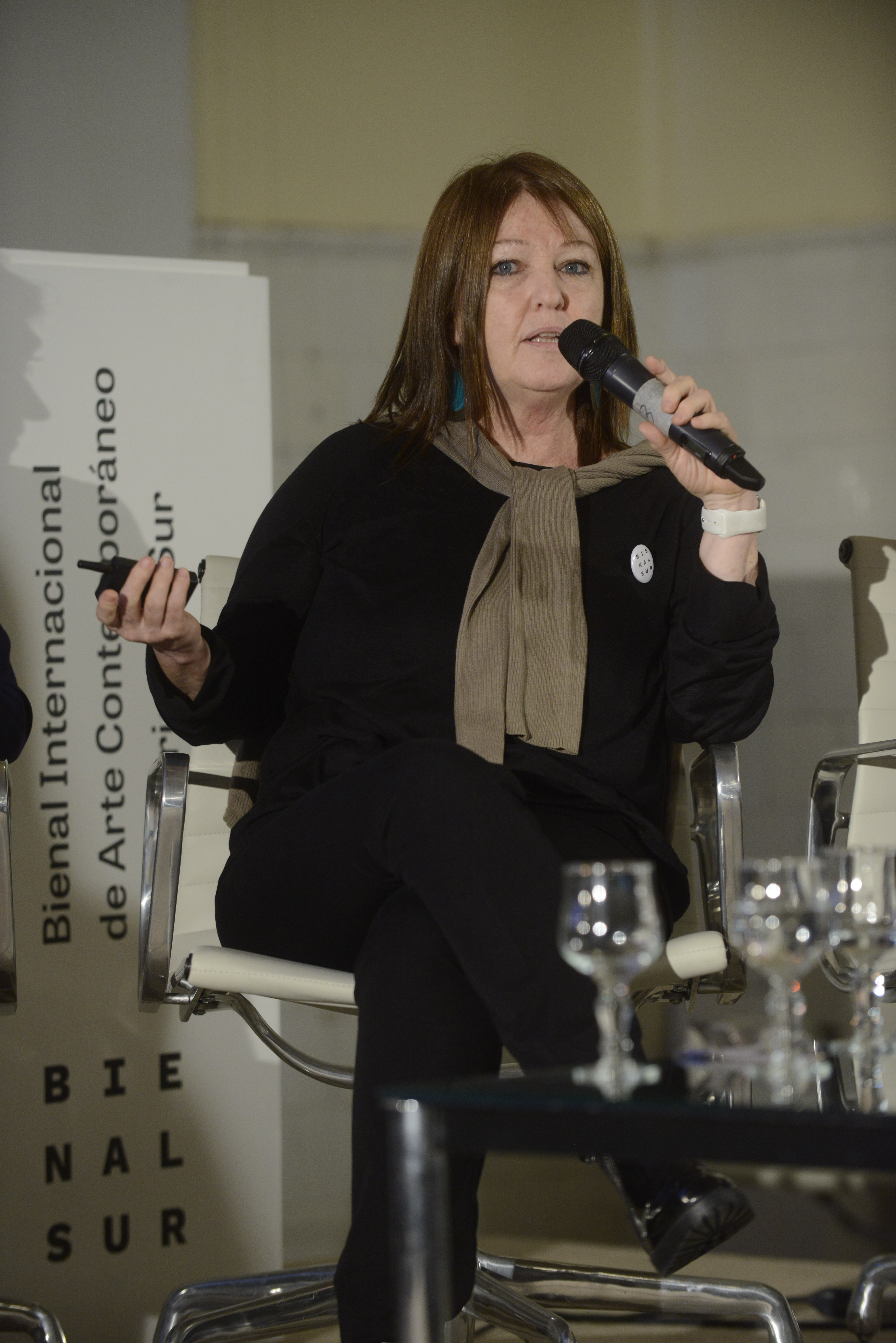 Fotografías de los invitados y participantes de la Bienal Sur 2016, realizada por la Universidad de Tres de Febrero.